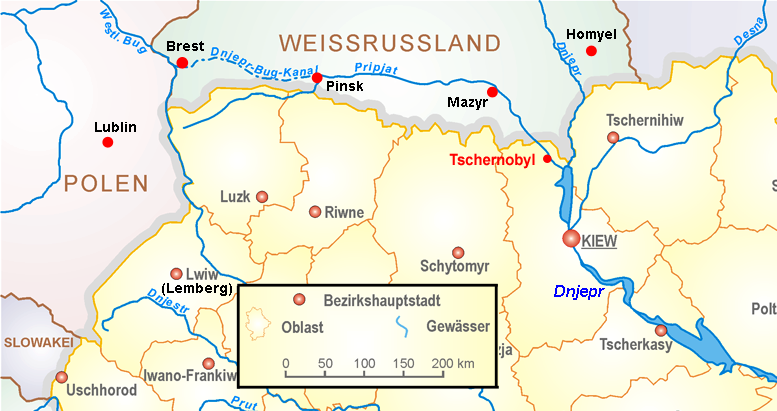 Ukraine Nordwest/ Weißrussland mit dem Pripjat. umgezeichnet (Ausschnitt, mit Ergänzungen einiger Städte, Weißrussl., PL)